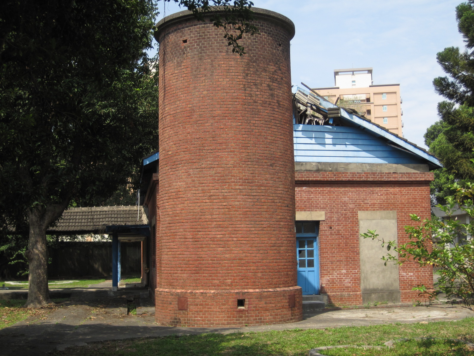 中文（台灣）: 磚造水塔與庫房。